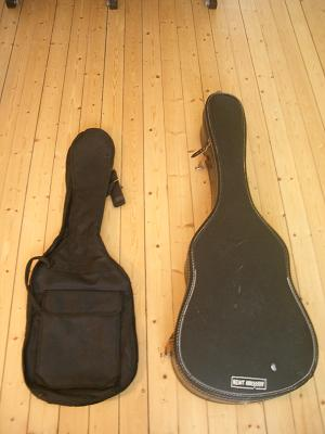 2 st gitarr fodral. Tagen av mig själv.